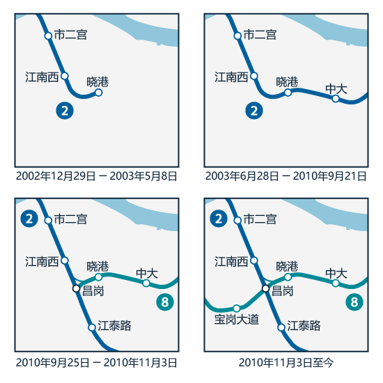 廣州地鐵二八號線在江南西~曉港地區之路線變遷